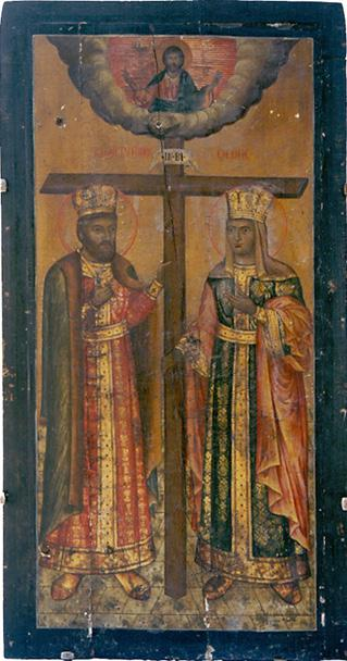 „Св. св. Константин и Елена“, 59 Χ 112 Χ 2. ΚΩΝCΤΑΝΤΙΝΟC Καὶ ΕΛΕΝΗC Διά χειρός Κωνσταντίνου / Λάμπρου Κολακιᾱ / 1854